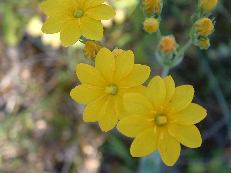 Blackstonia perfoliata (L.) Huds. Saint-Genis du bois (Gironde, France) 2004 - GFDL